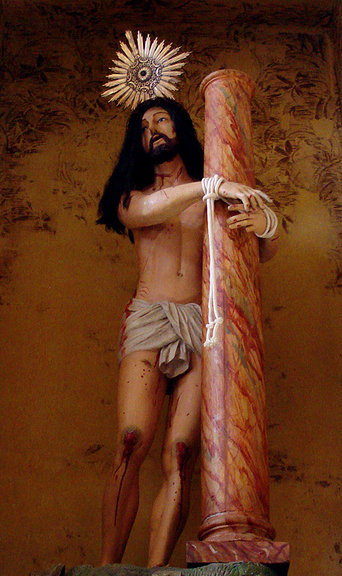 Cristo atado à coluna, origem portuguesa, século XIX. Igreja das Dores, Porto Alegre.